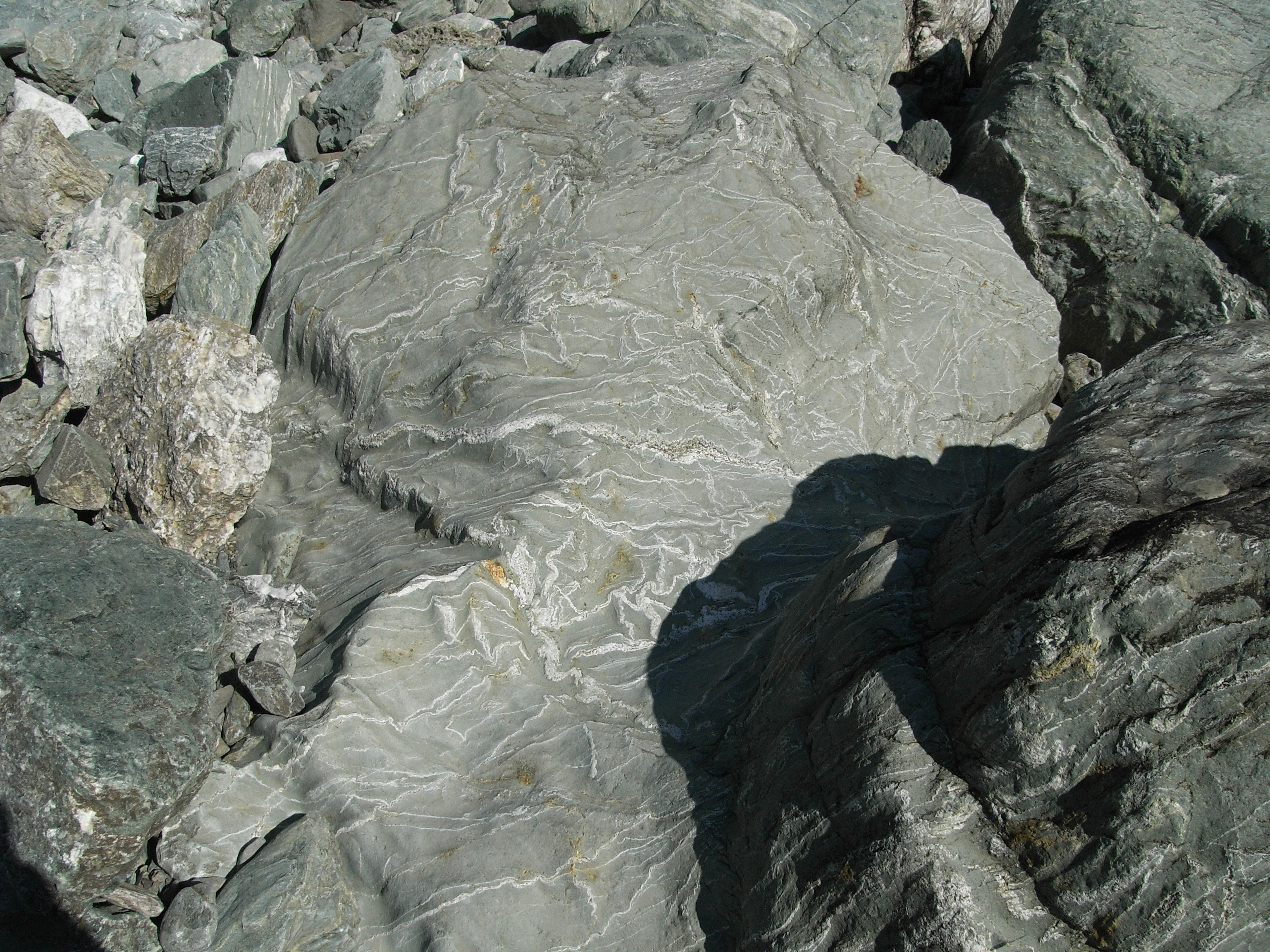 Rock